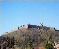 Vue de Montmédy-Haut